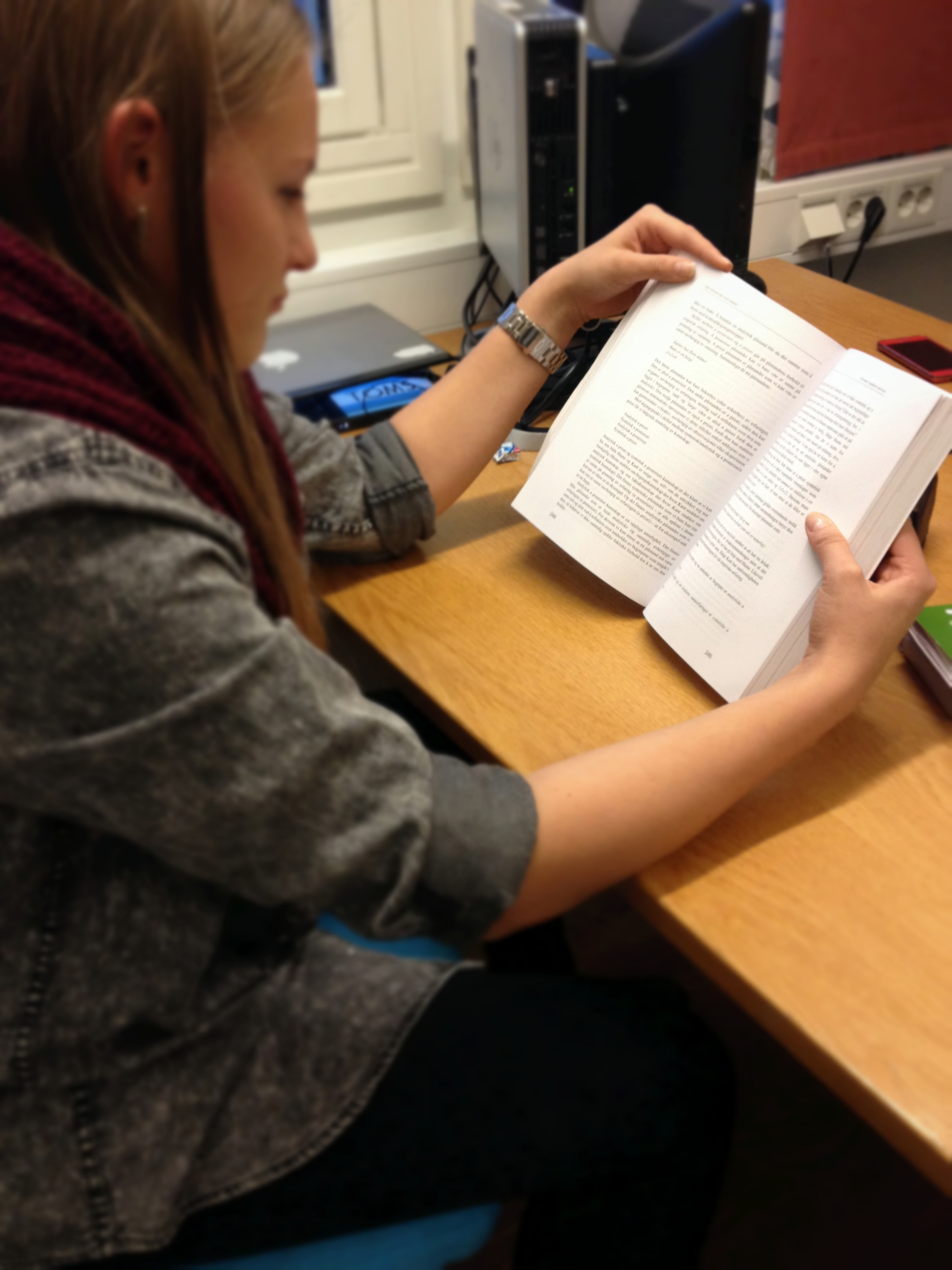 Leseteknikk